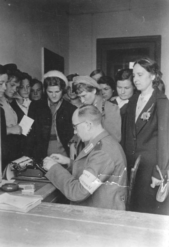 ADN-Zentralbild/Archiv II. Weltkrieg 1939-45 In den von den faschistischen deutschen Wehrmacht besetzten Gebiet in der Ukraine, Mai 1942. Die Zivilbevölkerung in Artemowsk [ Artjomowsk] muß sich in dem von der deutschen Zivilverwaltung eingerichteten Arbeitsamt melden, um bei Tauglichkeit als Zwangsarbeiter in der deutschen Rüstungsindustrie eingesetzt zu werden. Fertigstellung der Transportlisten für die gemusterten Ukrainerinnen. Aufnahme: Knödler [Scherl] 3314-42